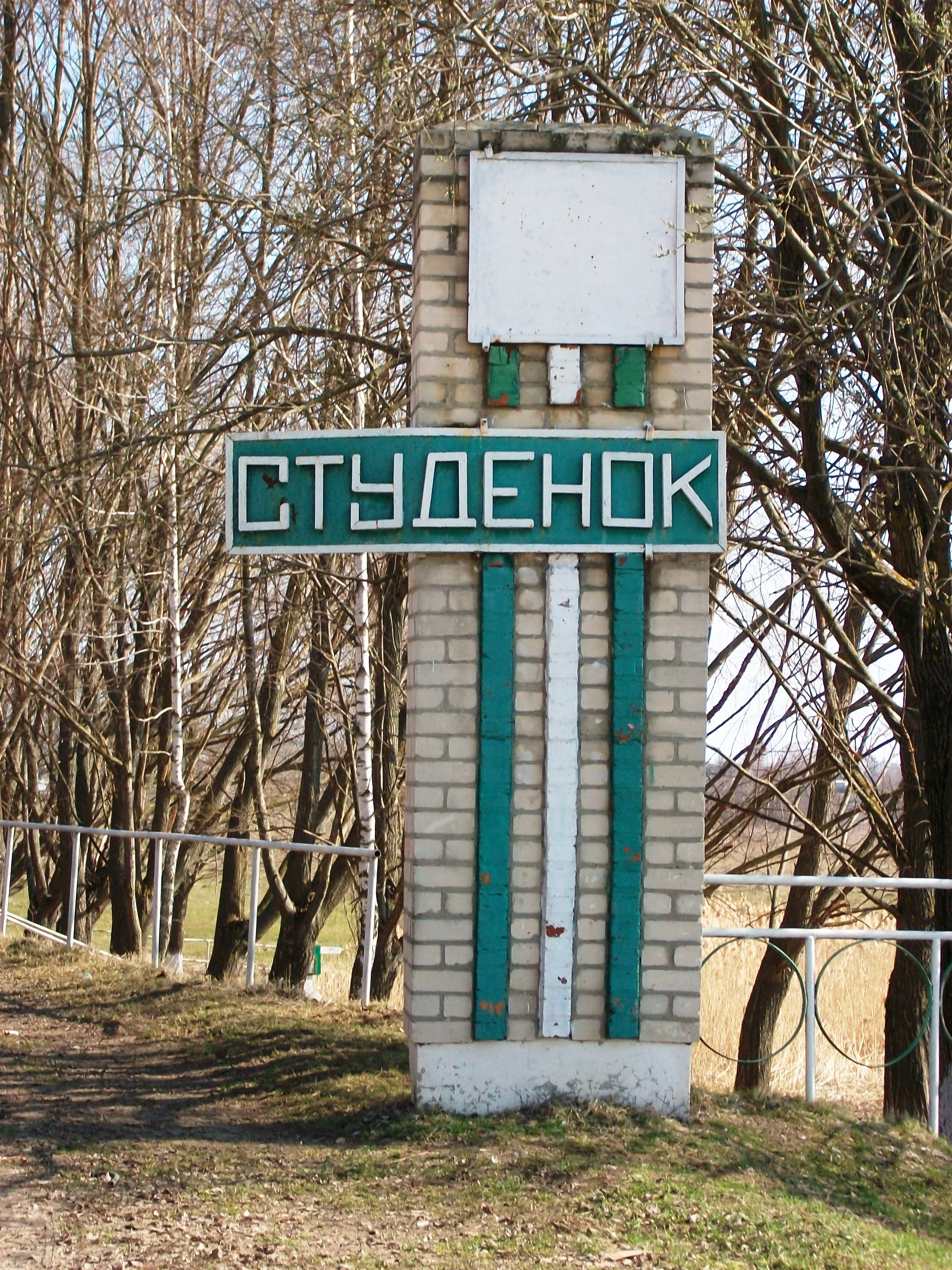 Студенок